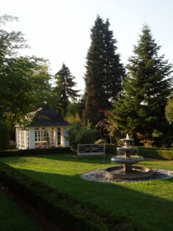 Siesmayer-Park in Karben. Eine Parkanlage des berühmten Frankfurter Gartenarchitekten Franz Heinrich Siesmayer (1817-1900). Der in Groß-Karben aufgewachsene Gartenkünstler kreierte zeitlebens an die 300 Parks und Gärten, darunter auch den Frankfurter Palmengarten. Zu den Merkmalen seines Schaffens zählte unter anderem das Spiel mit Wasser und Sichtachsen. Beides findet sich auch im Siesmayer-Park wieder. Die Anlage ist öffentlich zugänglich.